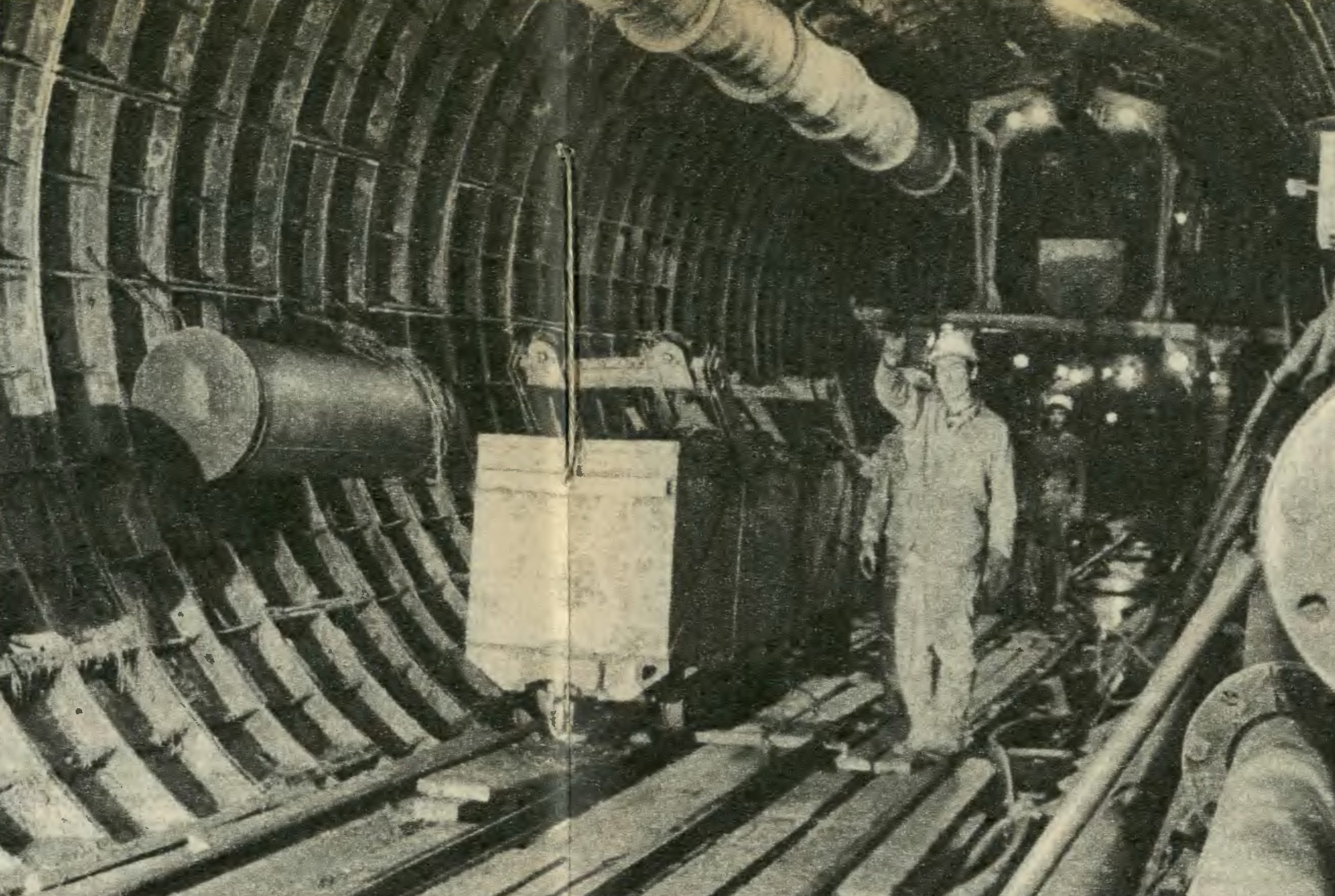 Budowa tunelu szlakowego metra B11 Pole Mokotowskie-Politechnika, czerwiec 1985.